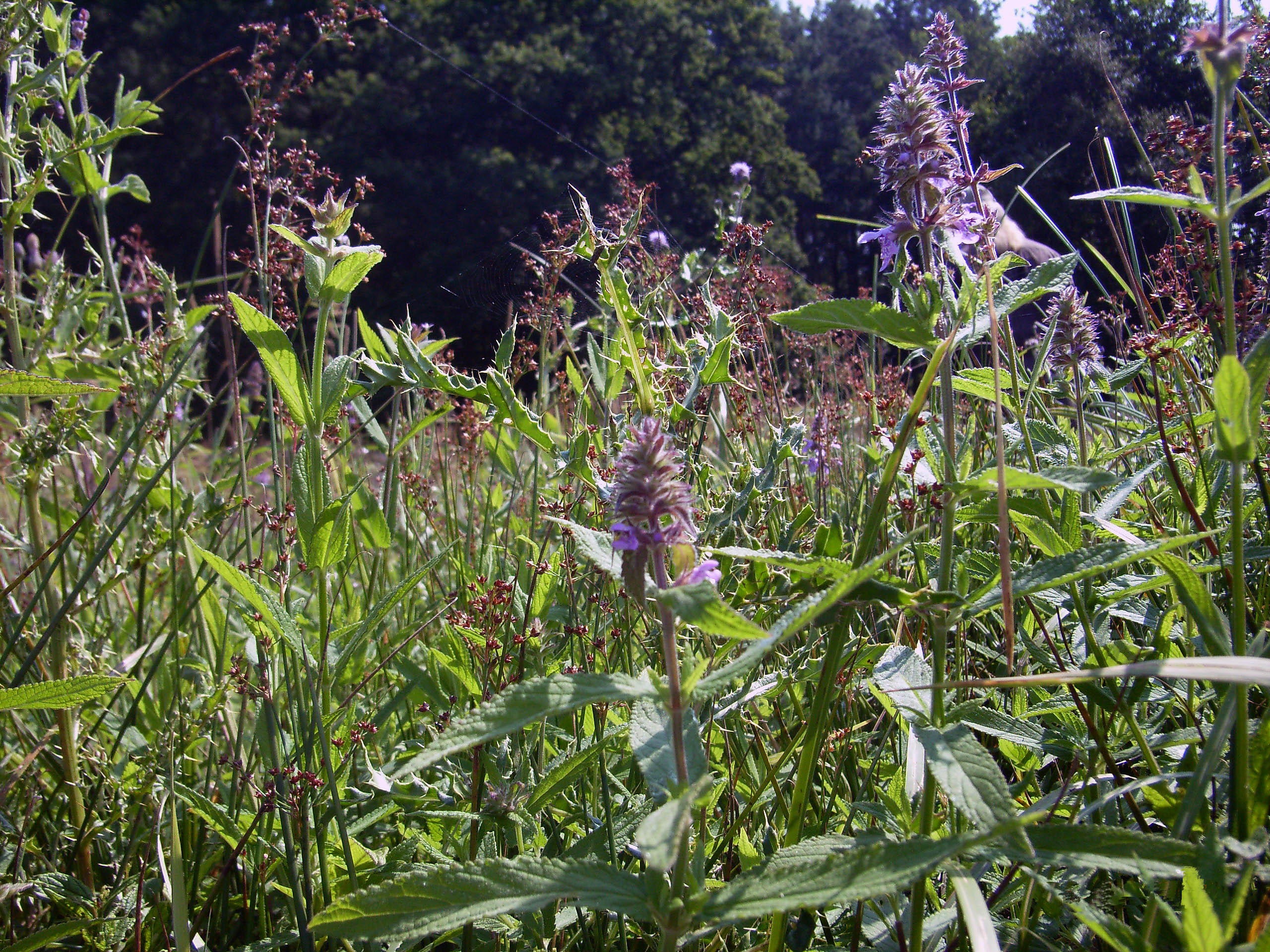 Feuchte Hochstaudenflur mit Sumpf-Ziest (Stachys palustris) und Spitzblütiger Binse (Juncus acutiflorus) auf Feuchtwiesenbrache, Nordwestdeutschland